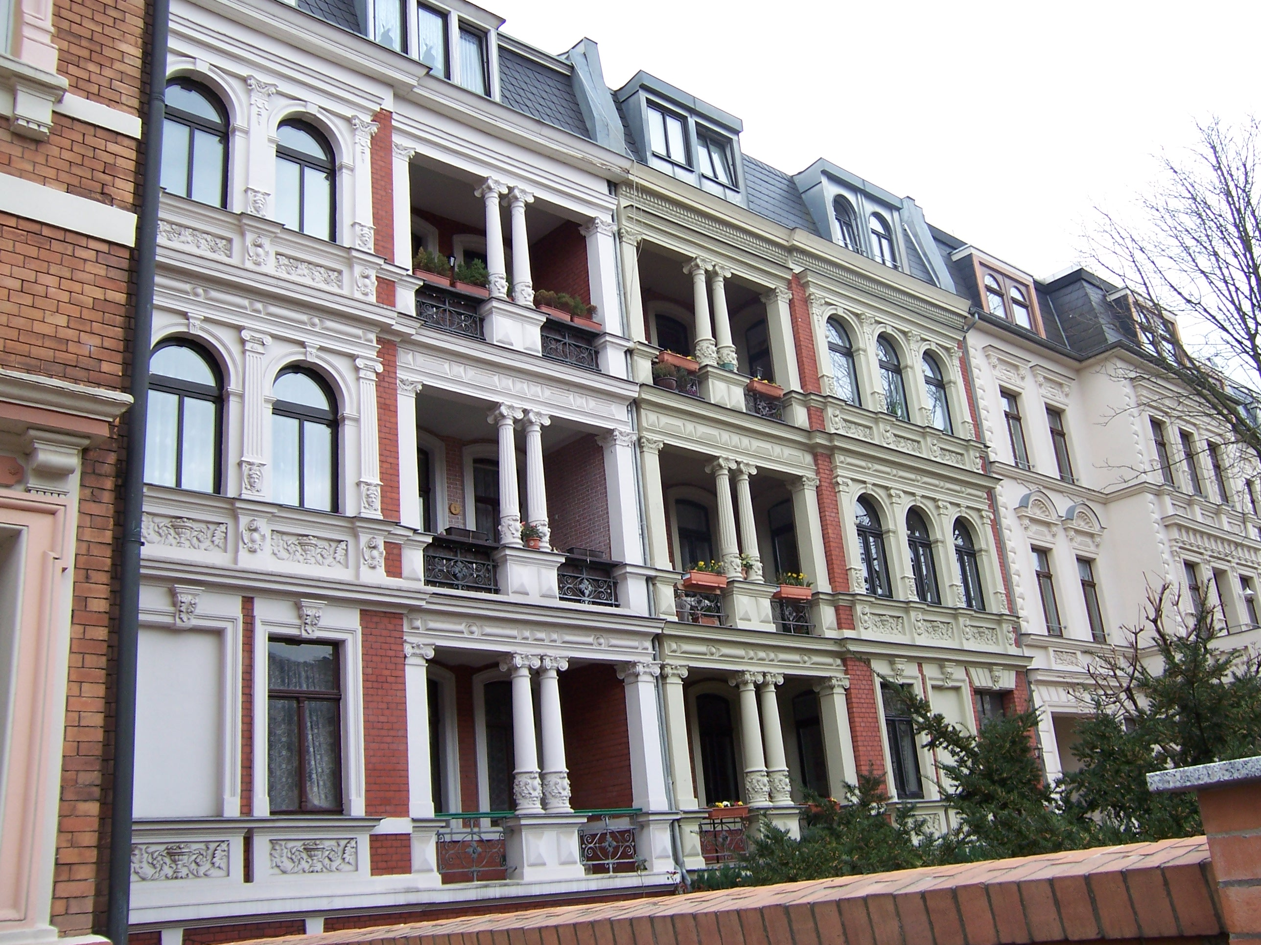 Belle Époque in der Schillerstraße 53-56